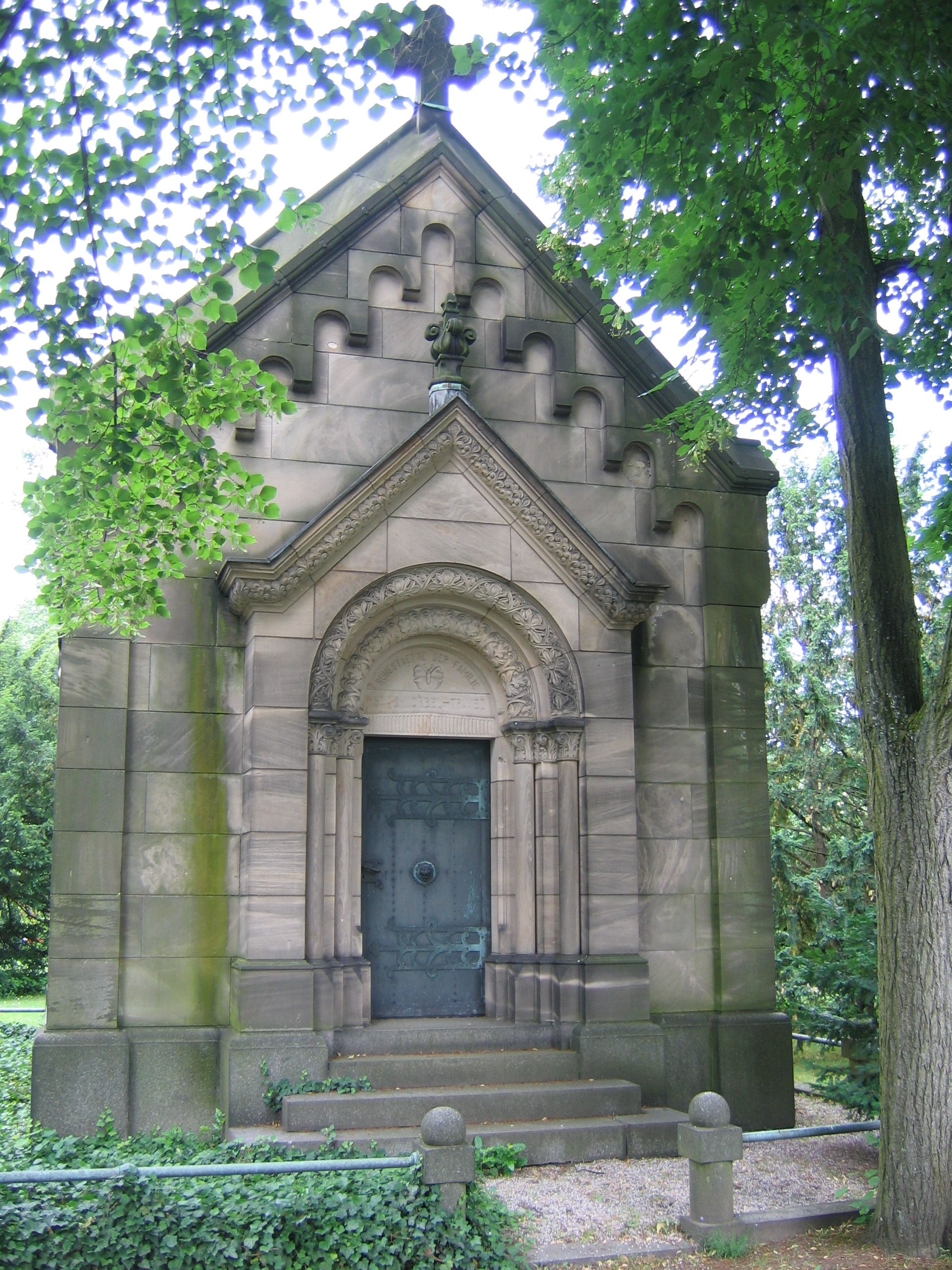 Hauptfriedhof Hanau: Gruftkapelle der Familien Seitz, Körbel, Traxel